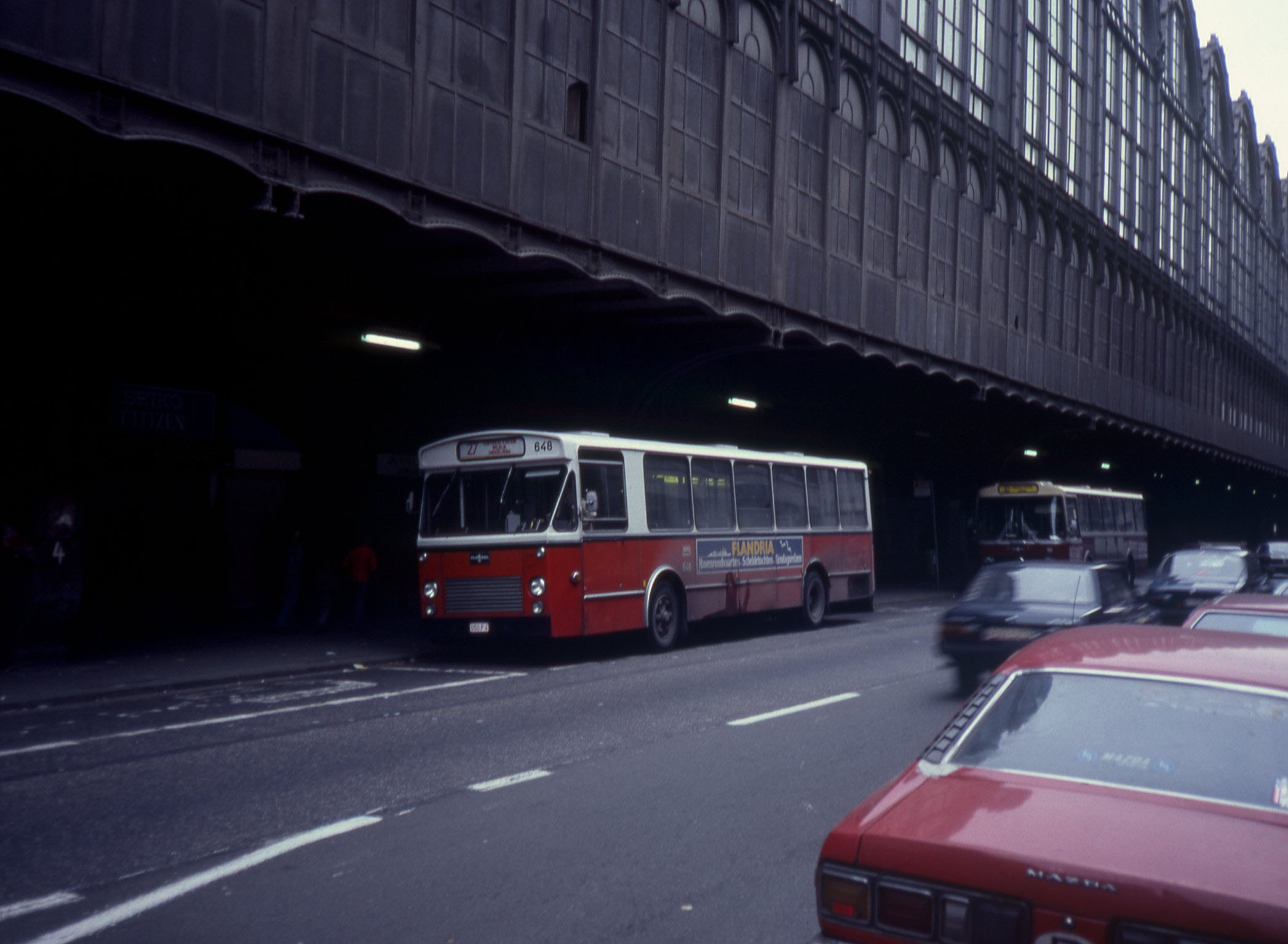 Een MIVA bus van lijn 27 bij het Centraal station. Het is een bus met een Van Hool carrosserie, een Fiat onderstel en een Allison schakelkast.